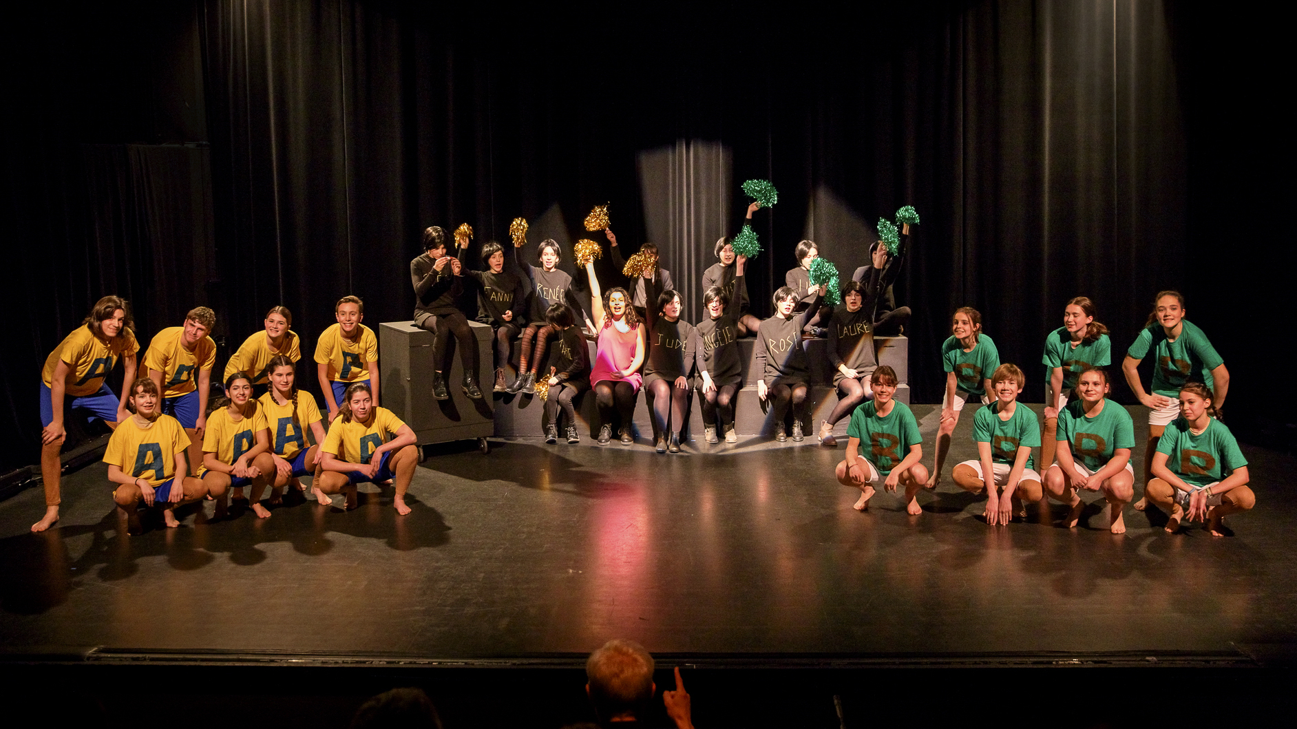 Chœur du Petit faucheux Spectacle "Le trésor de nos pères" Photo : Rémi Angelli